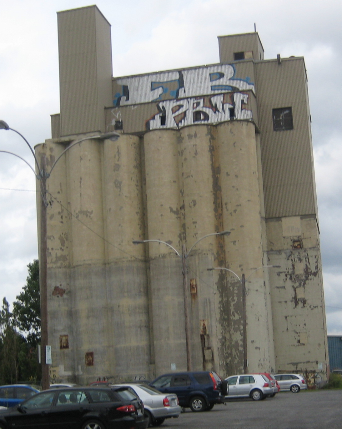 Il s'agit d'une illustration du Silo Lindseed Oil de Montréal.